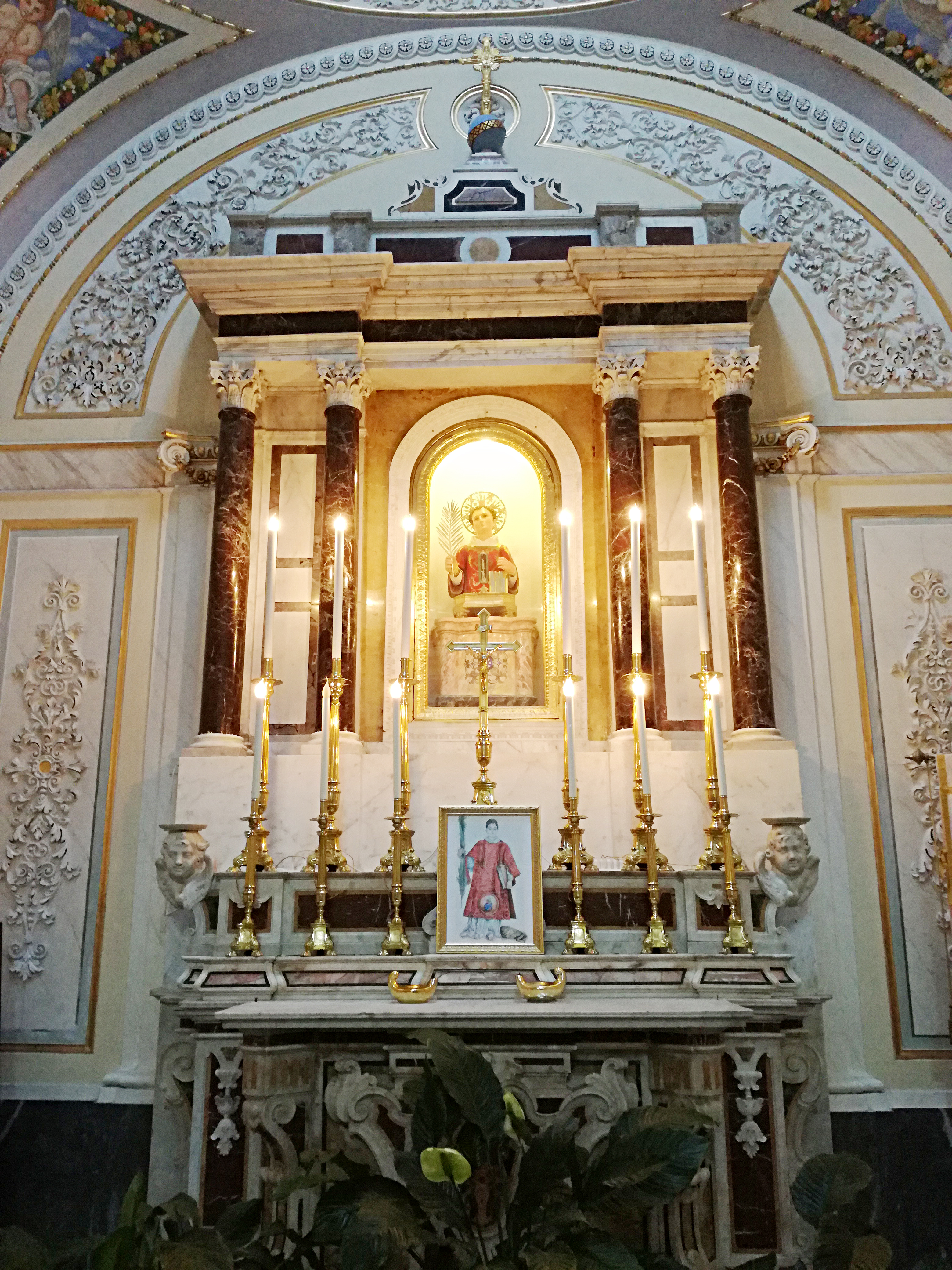 Cappella di San Cesario, Parrocchia San Cesario diacono e martire in Cesa (Caserta)